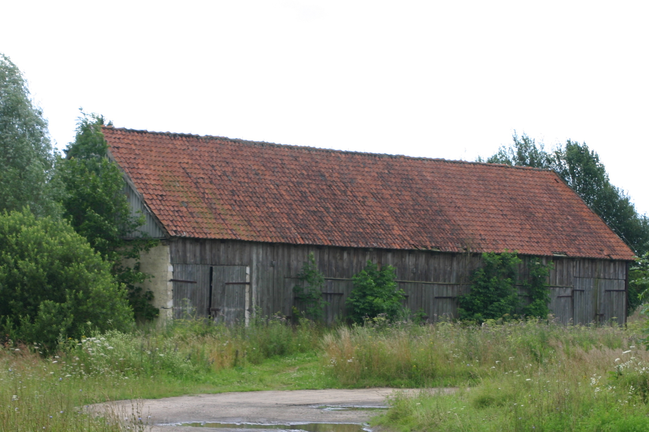 Wielewo (deutsch Willkamm) ist ein Dorf in Polen in der Wojewodschaft Ermland-Masuren. Das Dorf ist Teil des Schulzenamtes (sołectwo) Aptynty in der Gemeinde Barciany und gehört zum Powiat Kętrzyński.